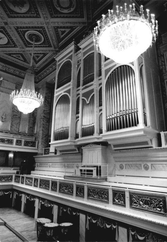 Berlin, Schauspielhaus, Orgel ADN-ZB Junge 27.9.84 Berlin: Schauspielhaus- Bildserie zur Wiedereröffnung als Konzerthaus am Vorabend des 35. Jahrestages-Ander Stirnseite des großen Konzertsaales ist eine Orgel mit 74 Registern, 4 Manualen und Pedalen sowie 5800 Pfeifen eingebaut. Die Pfeifen variieren zwischen 8 mm und 5m. Das Instrument ist ein Werk des VEB Jehmlich Orgelbau Dresden. Sperrfrist: Dienstag, 2.10.84 4.00 Uhr Uhr